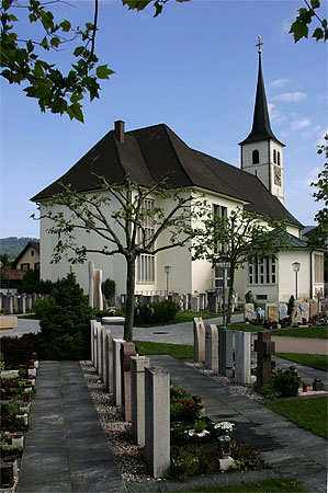 Kirche in Röschenz